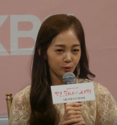 21일 오후 서울시 강남구 논현동 임피리얼 팰리스 서울에서 KBS 2TV 새 수목드라마 ‘단, 하나의 사랑’ 제작발표회가 열려 배우 김명수X김인권X김보미X도지원X이동건X신혜선이 참석해 기자 발표회 종료 인사와 본방 사수를 부탁하고 있다.